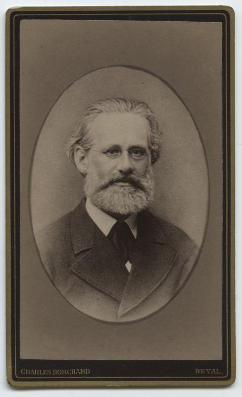 Alexander Hörschelmann (1836–1885), alates 1864 Hageri Lambertuse koguduse õpetaja